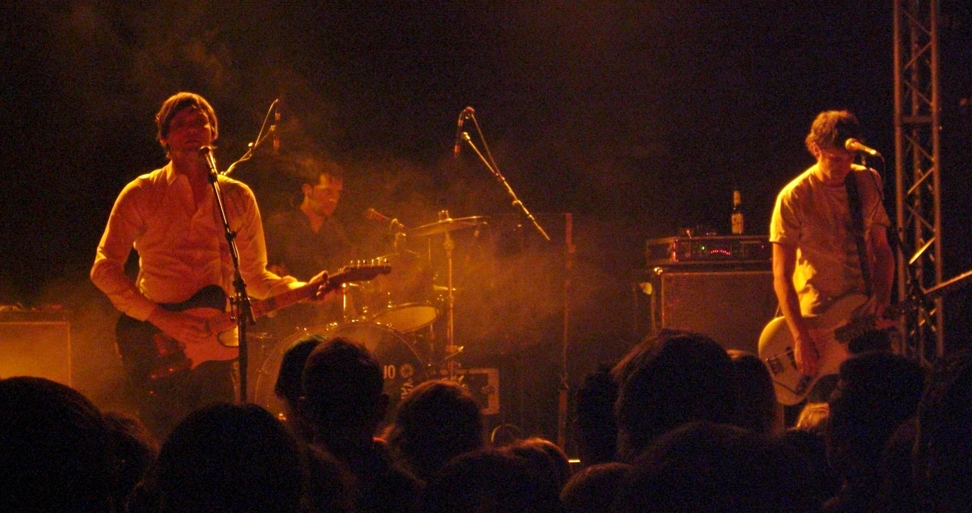 Die Augsburger Musikgruppe Anajo bei einem Auftritt im Berliner Club Lido am 17. Dezember 2009